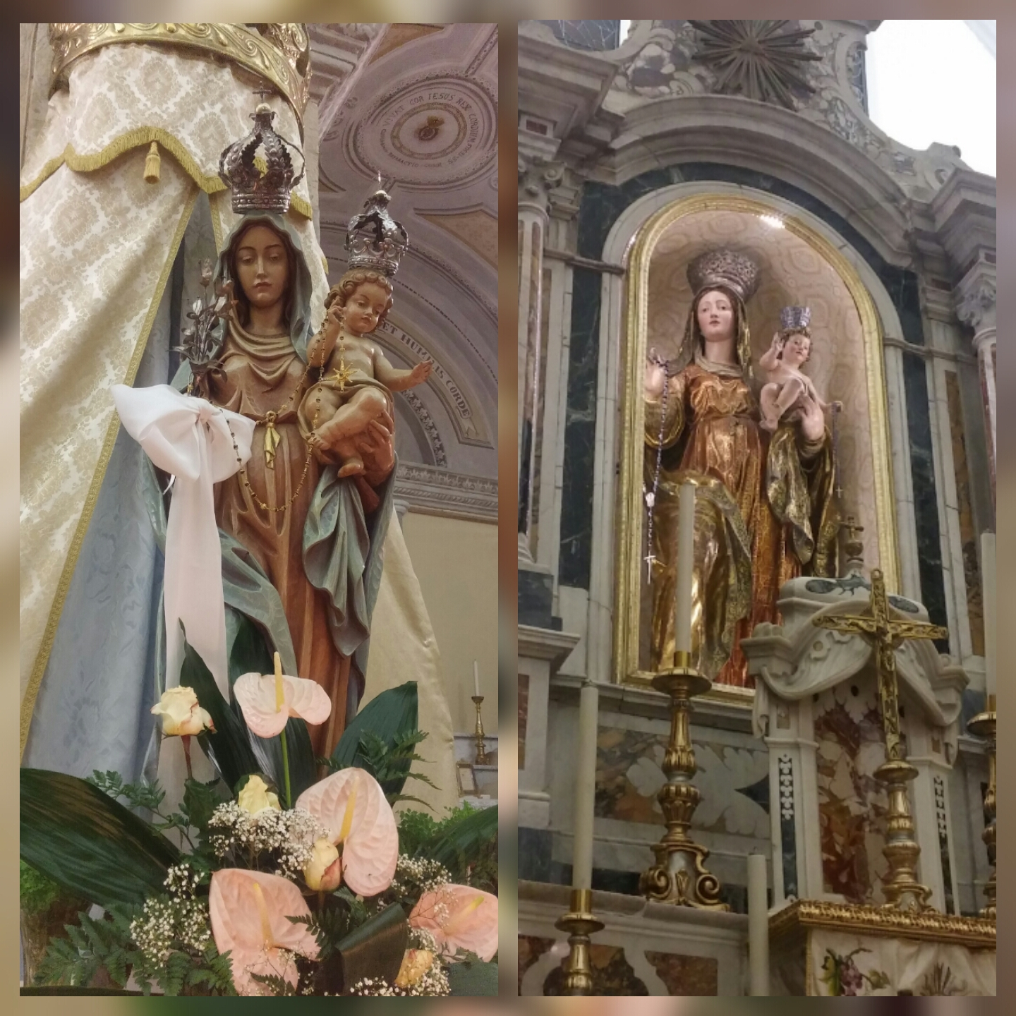 "Sa Gloriosa"